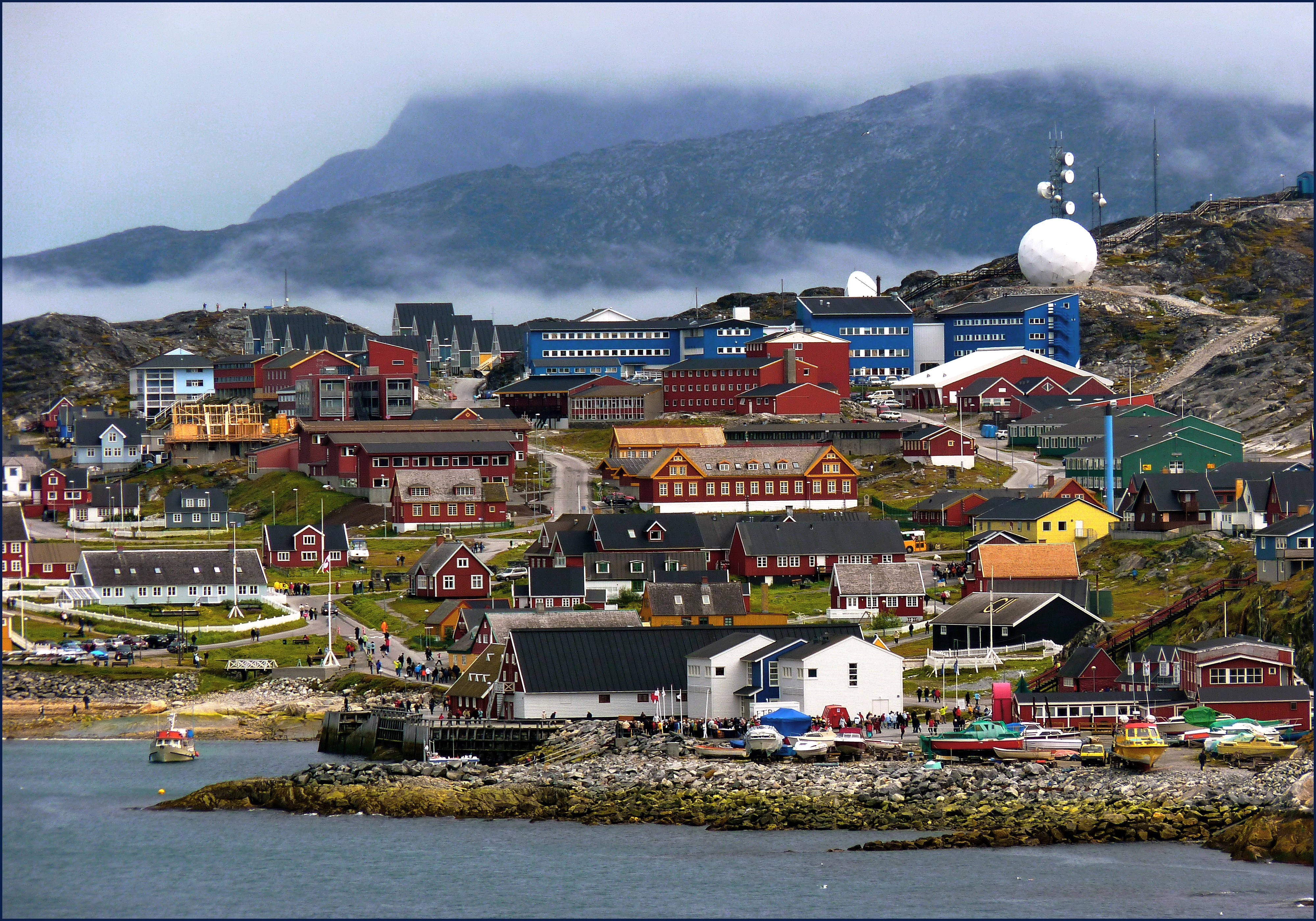 Nuuk